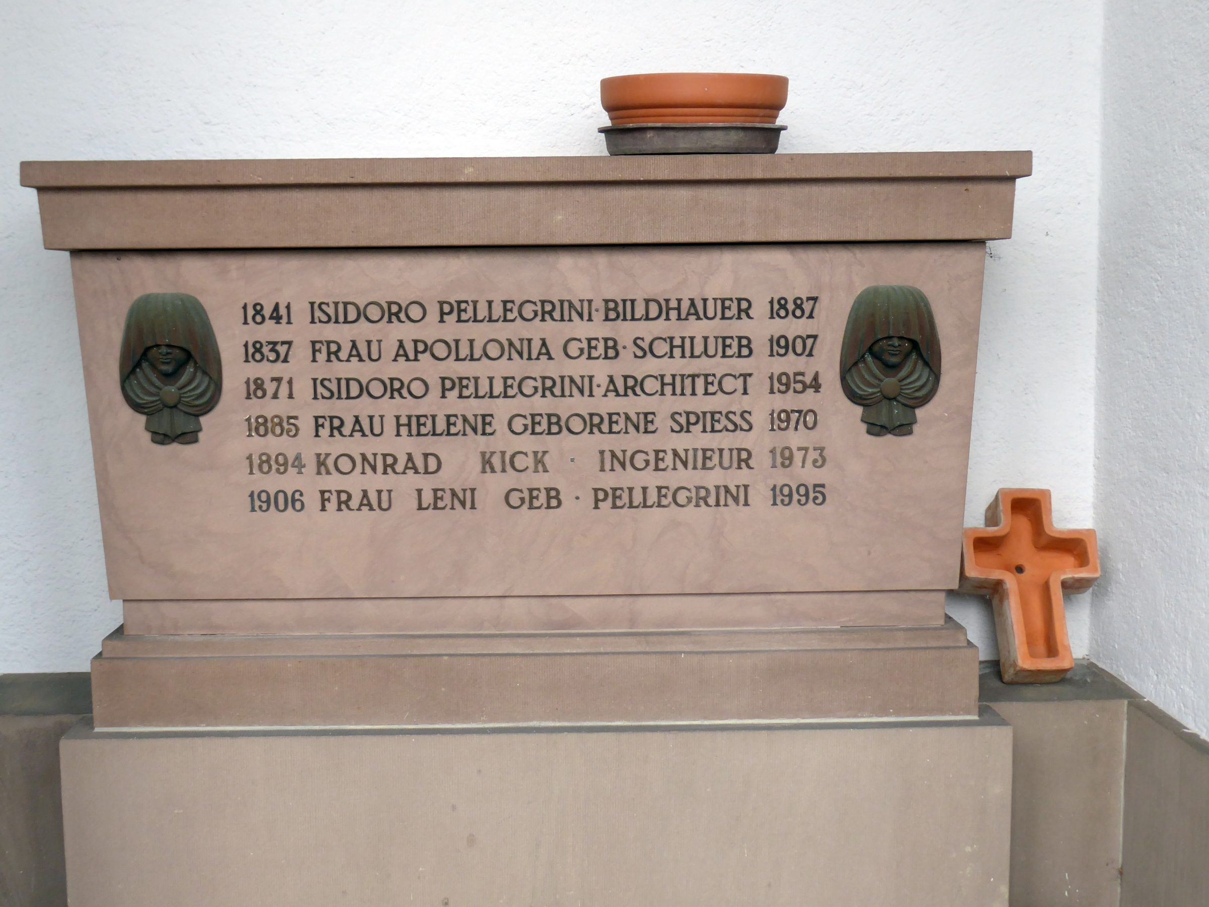 Isidoro Raphael Pellegrini (1871–1954) Architekt, Bildhauer, Familiengrab auf dem Friedhof am Hörnli